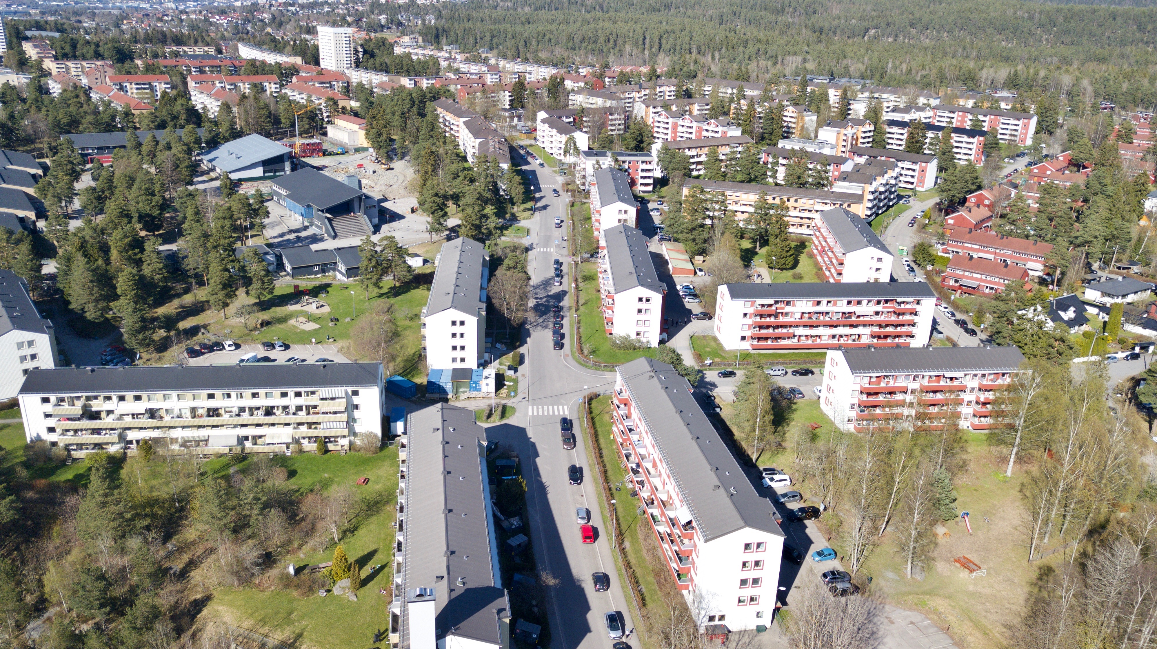 Vetlandsveien. Oppsal i Oslo.